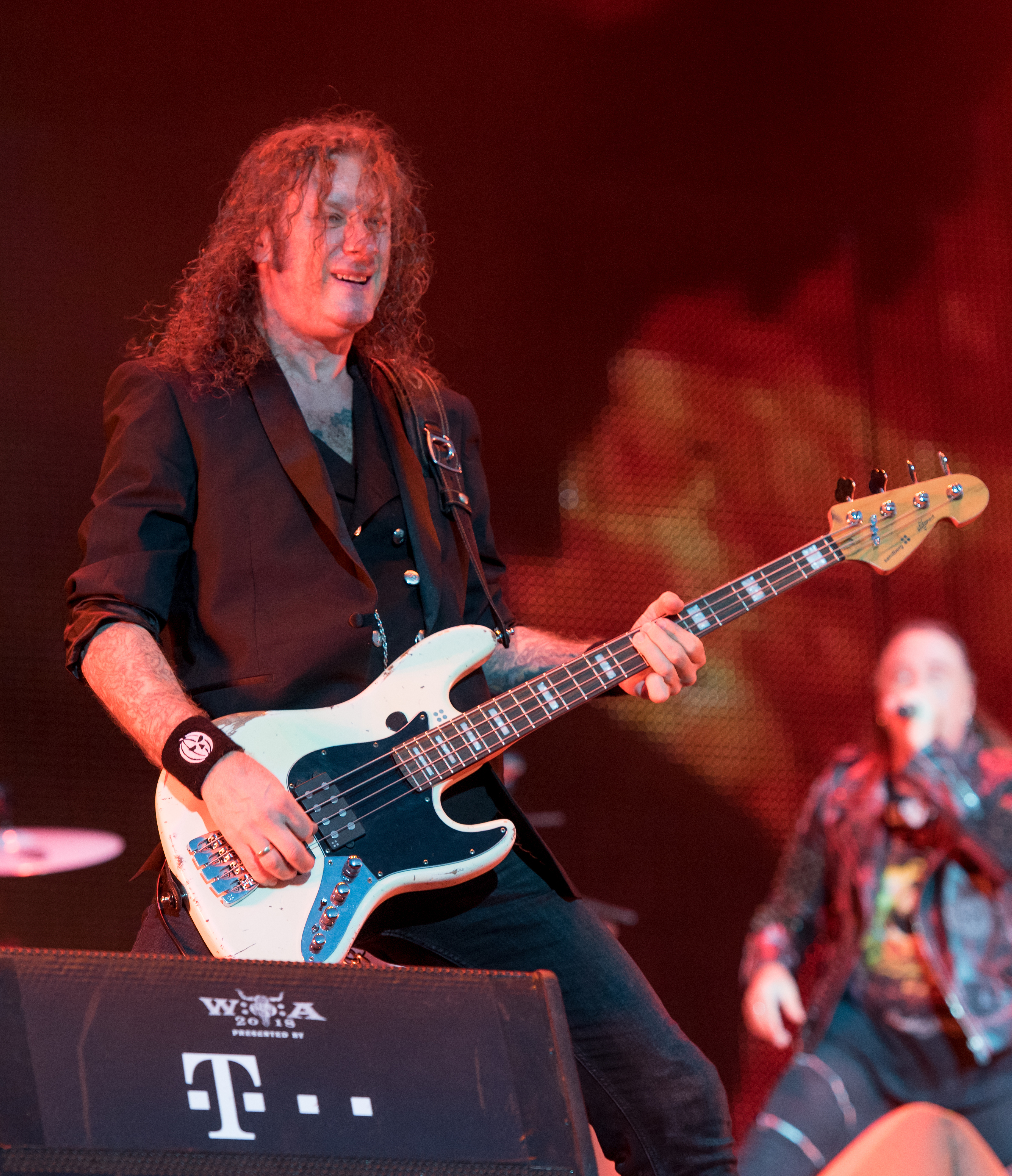 Helloween - Pumpkins United beim Wacken Open Air 2018